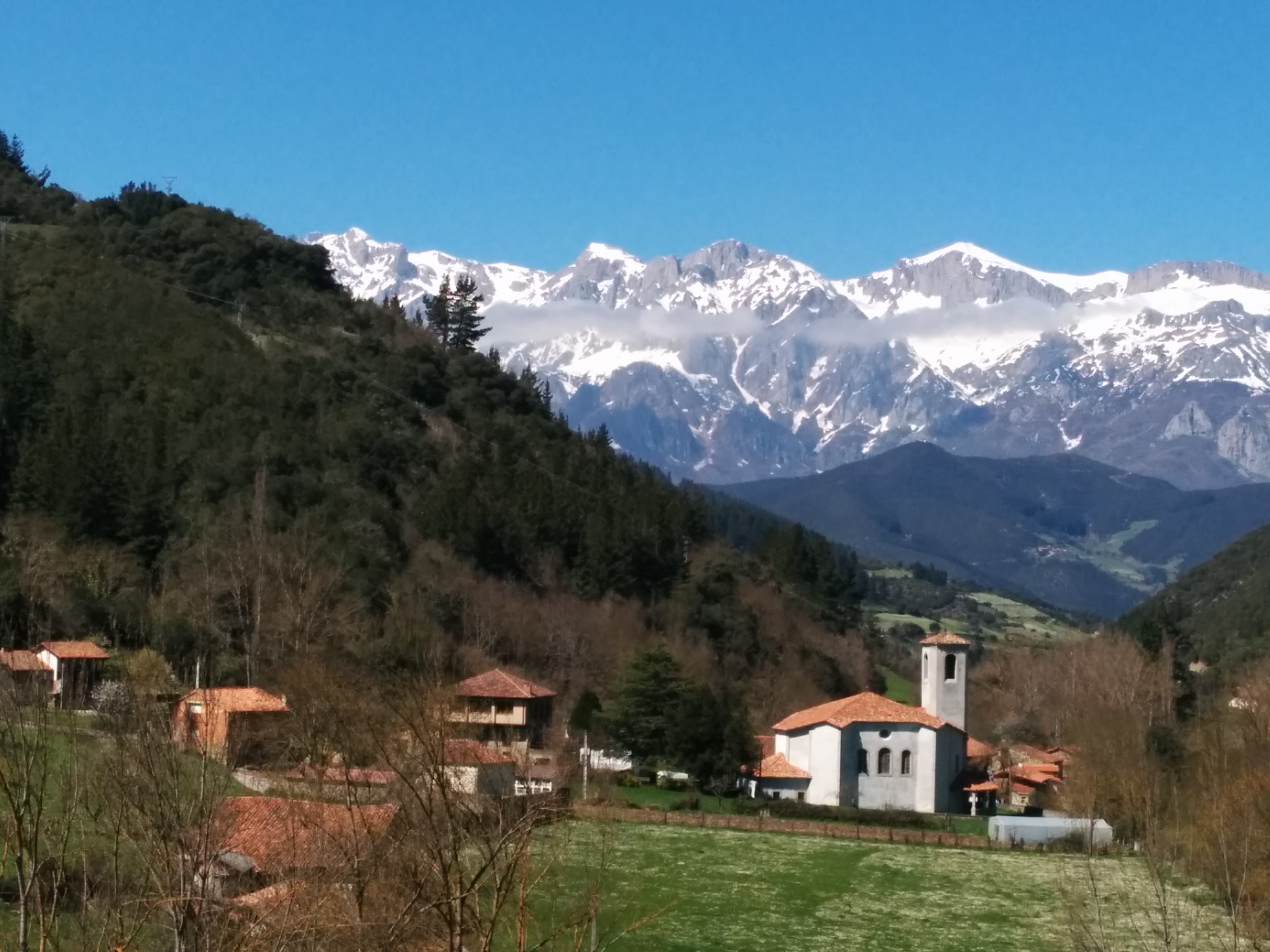 Vista de Cabezón de Liébana. Al fondo, los Picos de Europa.